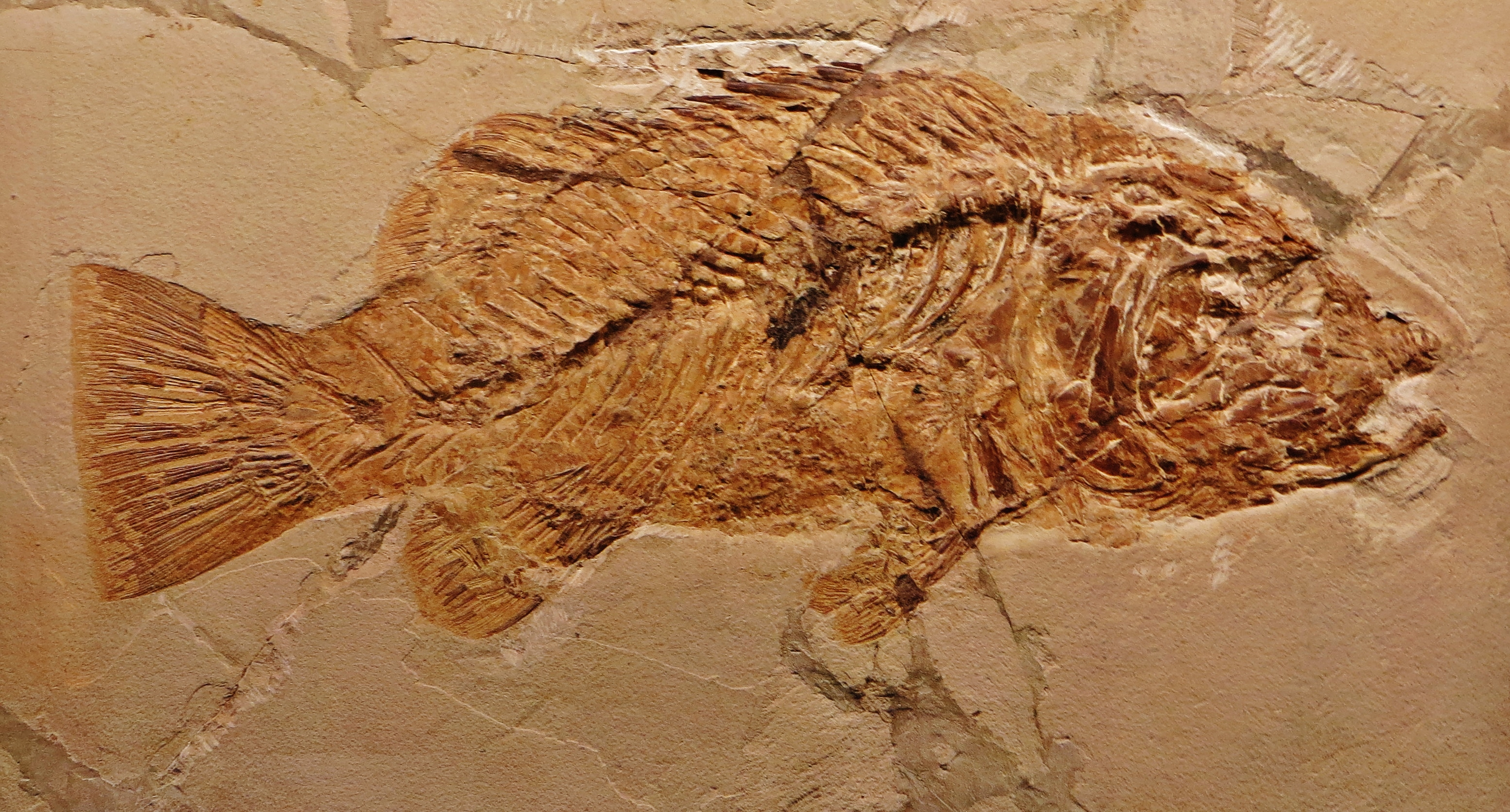 Fossil - Took the picture at Museo di Storia Naturale di Ferrara